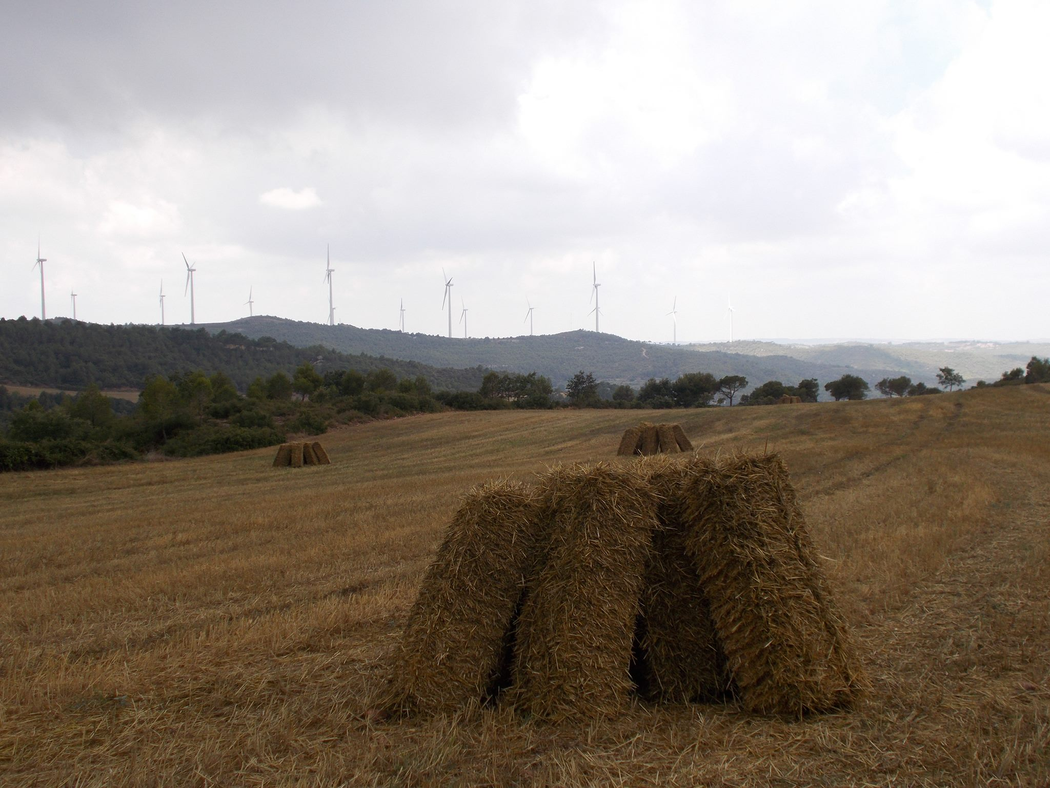 Camps segats a la Serra de Rubió el 17 d'agost de 2015.